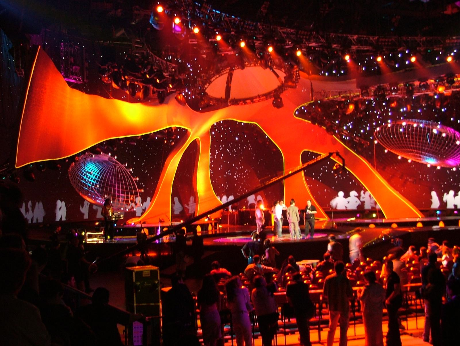 Assajos individuals